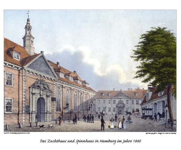 Werk- und Armenhaus / Zuchthaus (links), Spinnhaus und Herrenstall (rechts) in Hamburg am Alsterthor, 1840